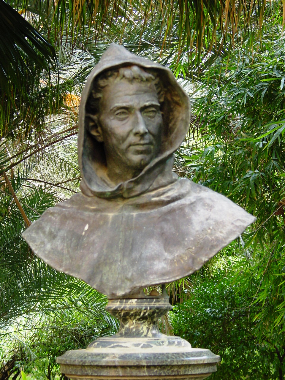 Padre Bernardino da Ucria (1739 – 1796)